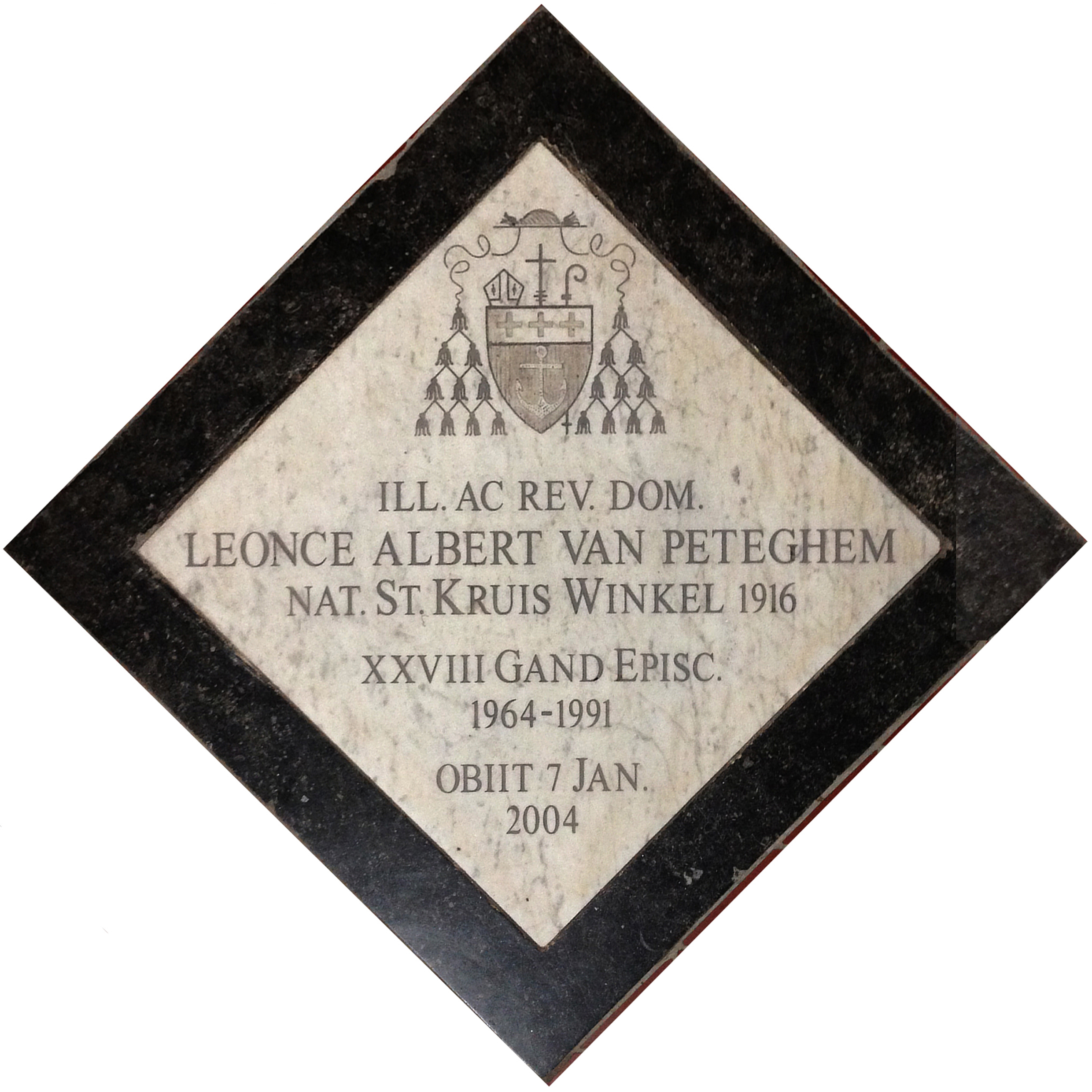 Grafplaat bisschop Leonce Albert Van Peteghem in de crypte van de Sint-Baafskathedraal te Gent